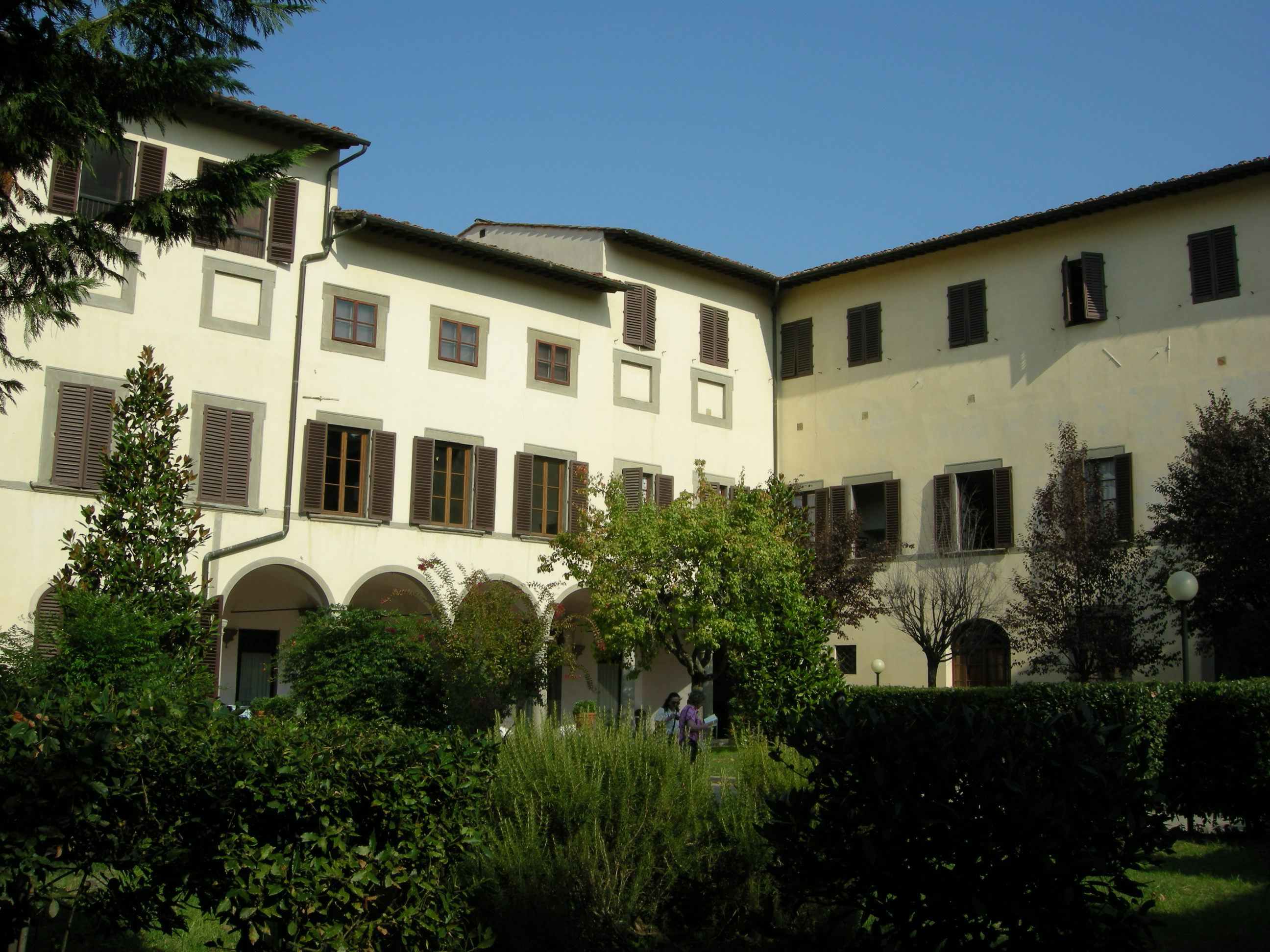 Palazzo ricasoli salviati, facciata su giardino